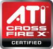 Cross